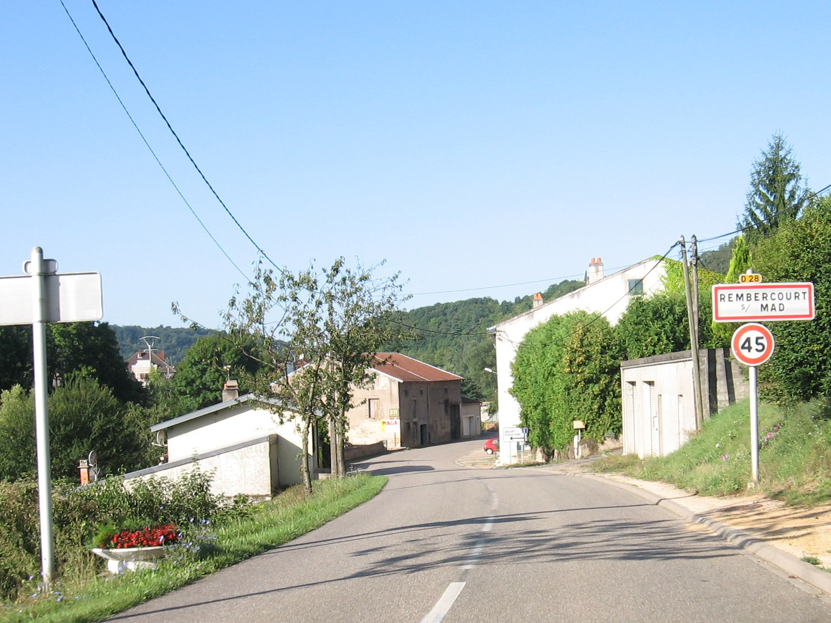 Rembercourt-sur-Mad